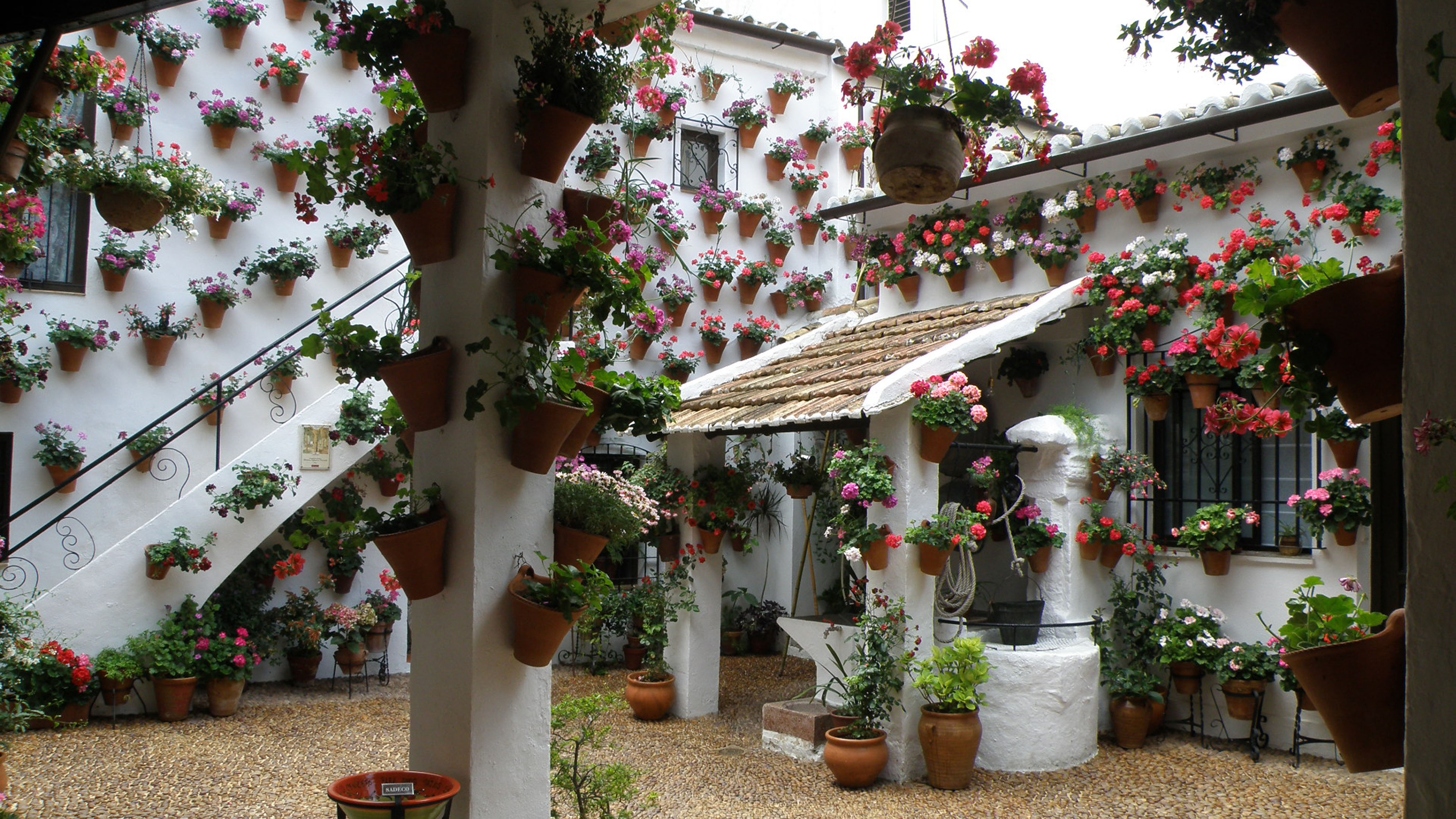 Patio de Córdoba (España).